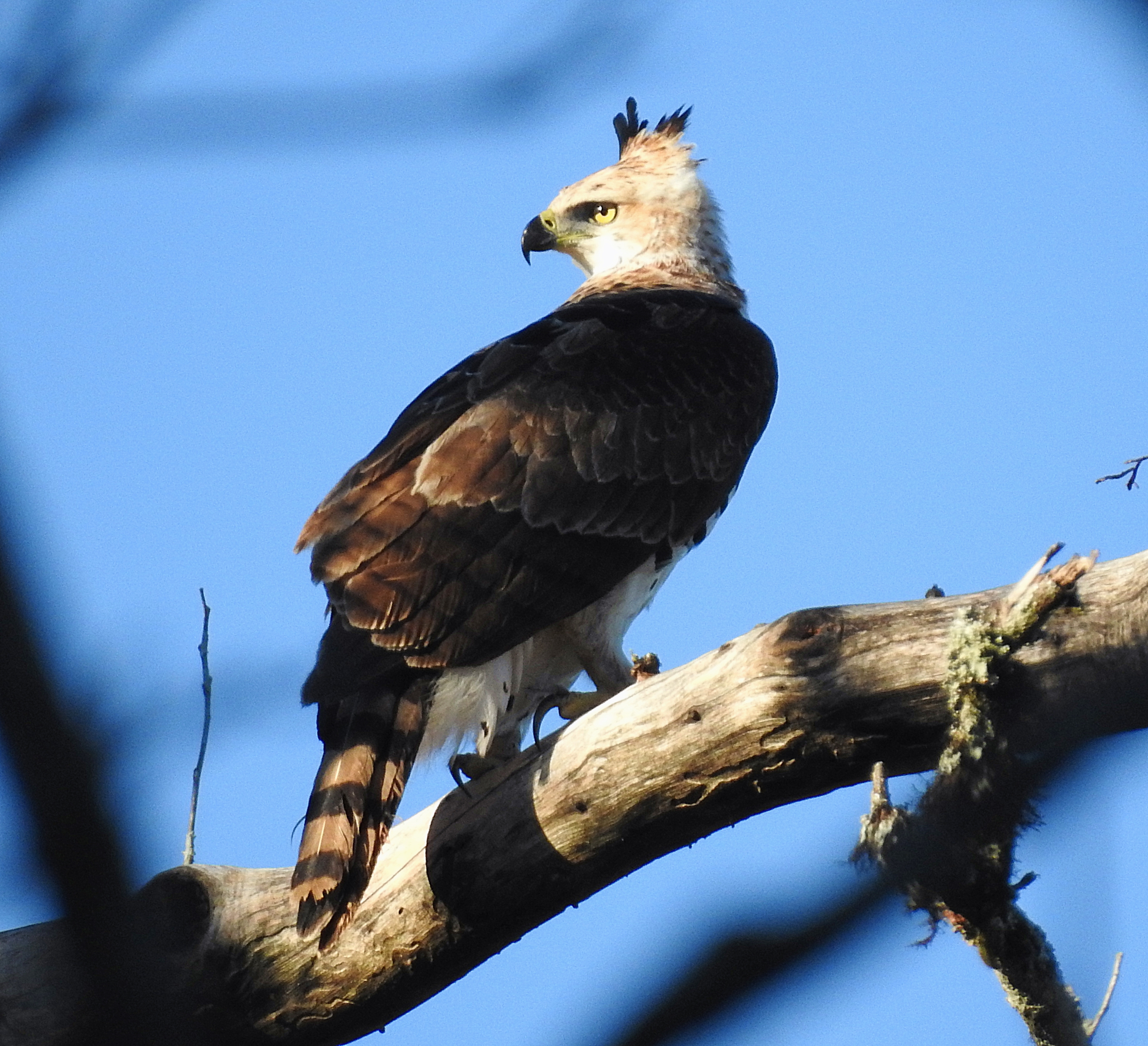 Parque Estadual do Turvo de nível Estadual, localizado (a) em Derrubadas (RS)